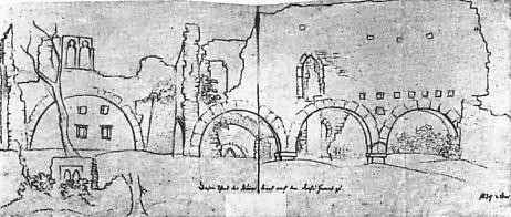 Zustand der Westfassade des Palas aus dem 15. Jahrhundert um 1870.